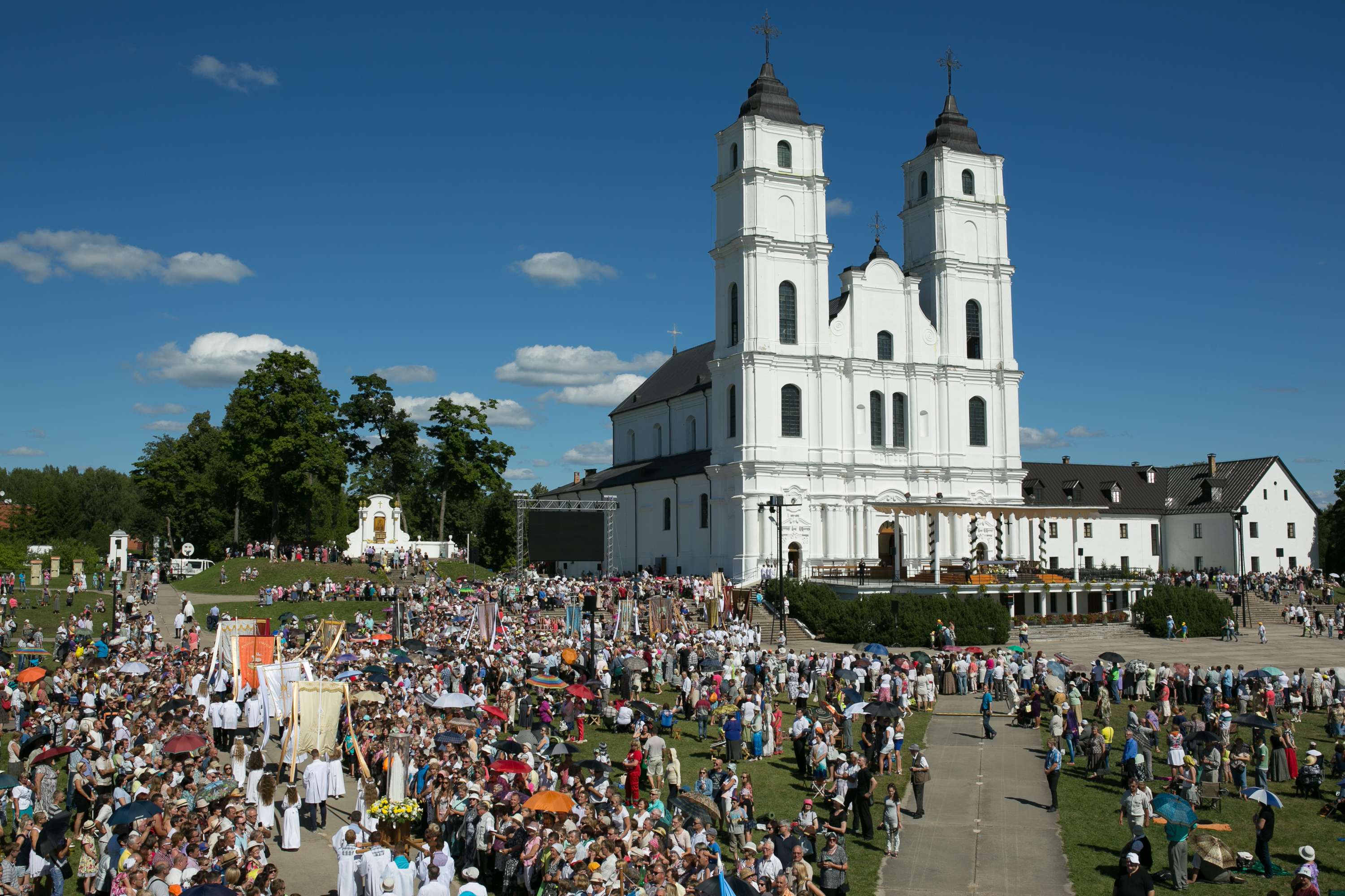 2015.gada 14.augusts. Saeimas priekšsēdētāja Ināra Mūrniece Aglonā piedalās Vissvētākās Jaunavas Marijas debesīs uzņemšanas svētku pasākumos. Foto: Ernests Dinka, Saeimas Kanceleja Izmantošanas noteikumi: saeima.lv/lv/autortiesibas